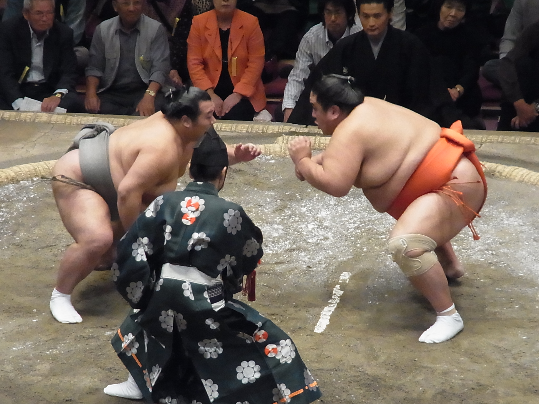 雅山 哲士